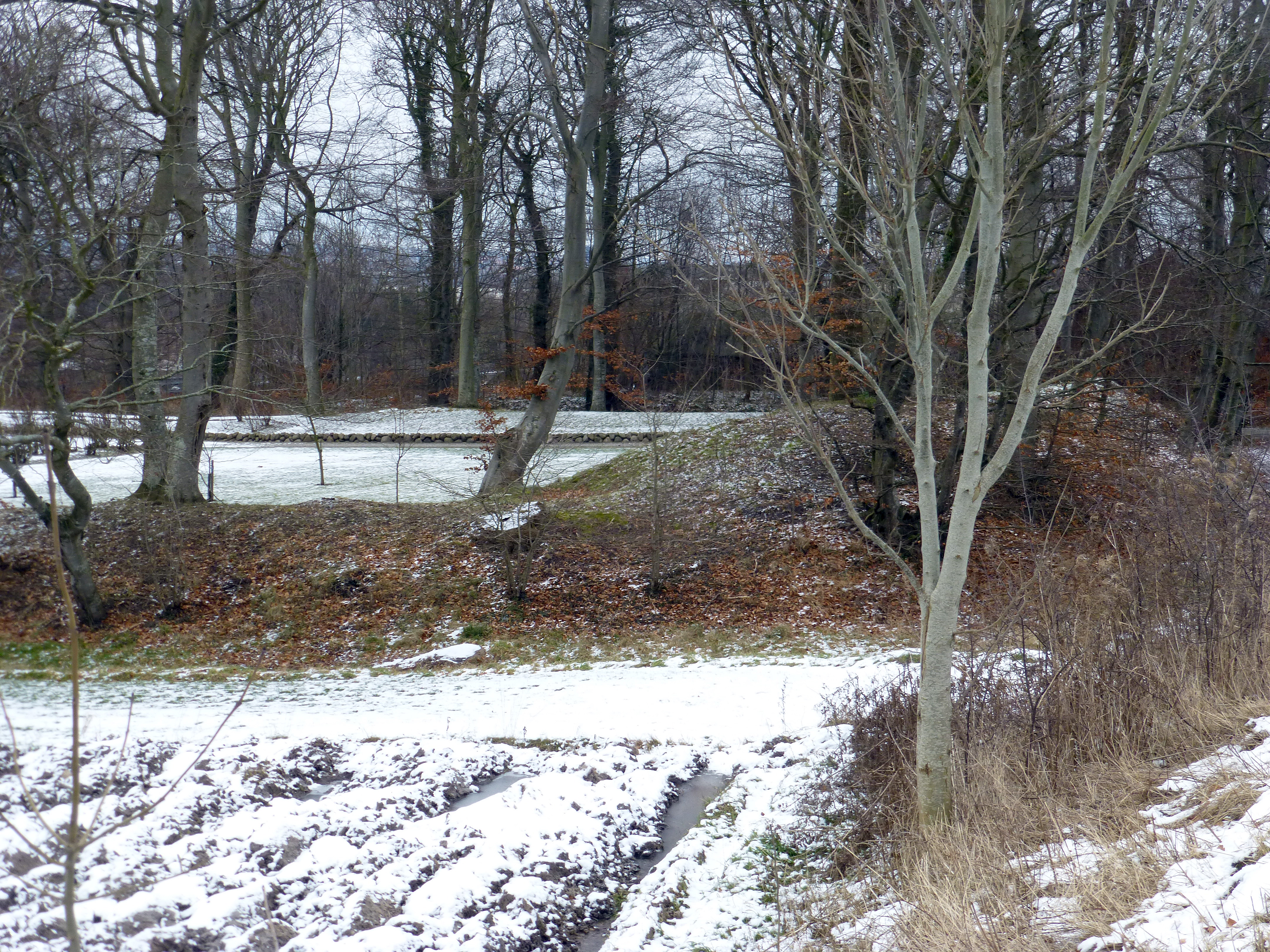 Bådstedgård eller Bodstedgaard. Sydvolden set mod øst